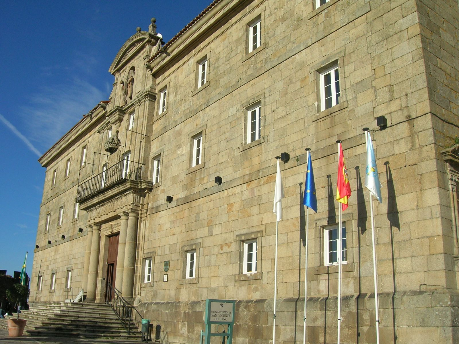 La fachada principal del monasterio es neoclásica, con tres plantas y sin apenas ornamentación en la piedra.